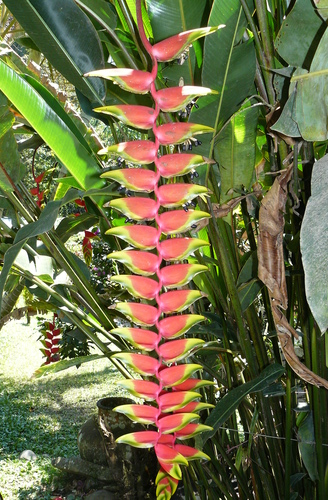 Heliconia en San Jose de Suaita